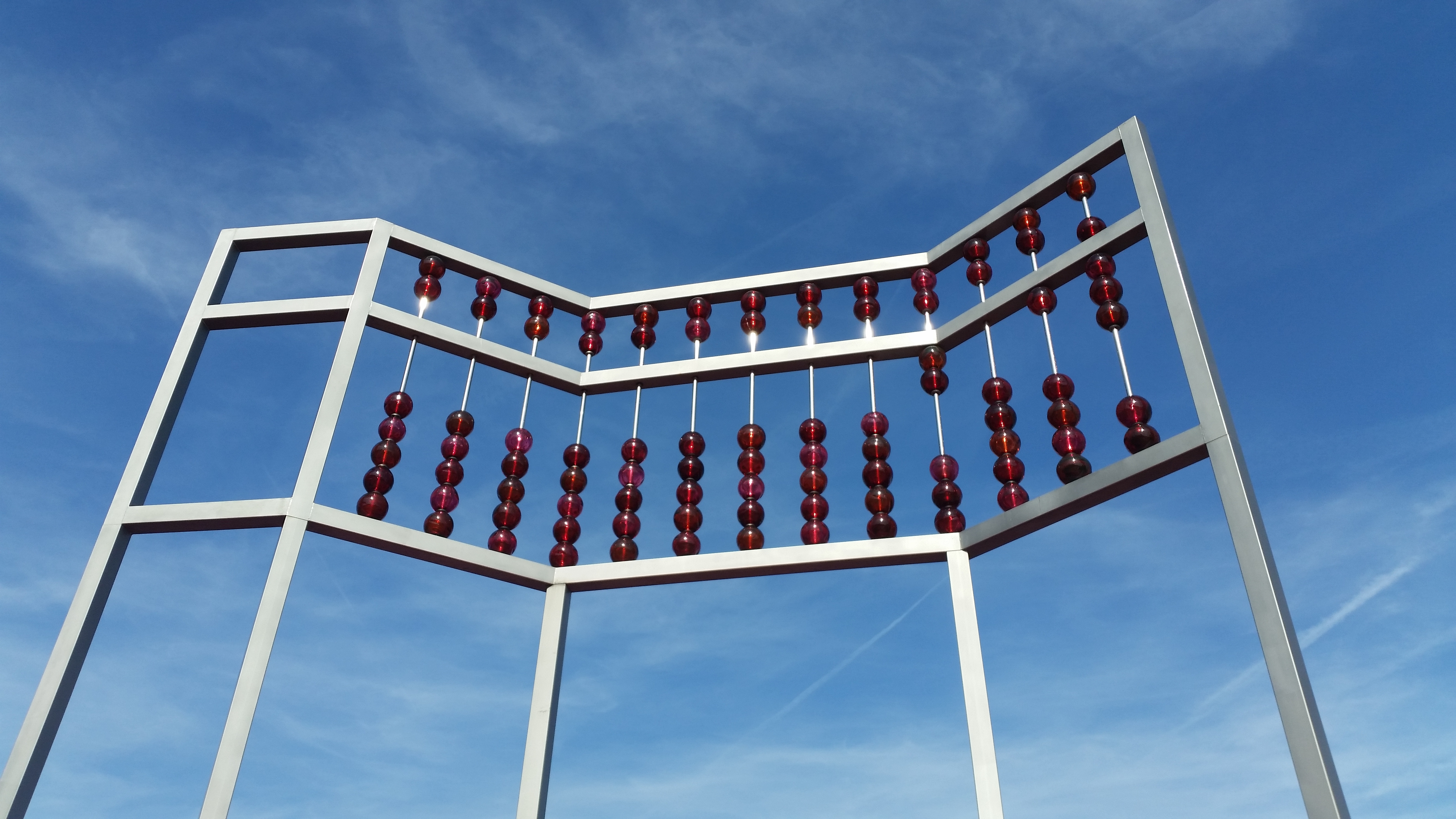 HIV/AIDSmonument